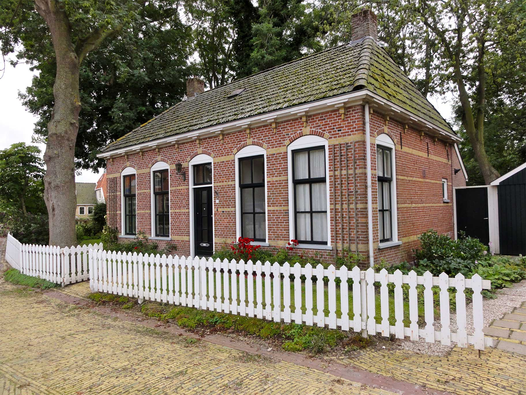 Kosterswoning Kerkeburen 35 te Makkum